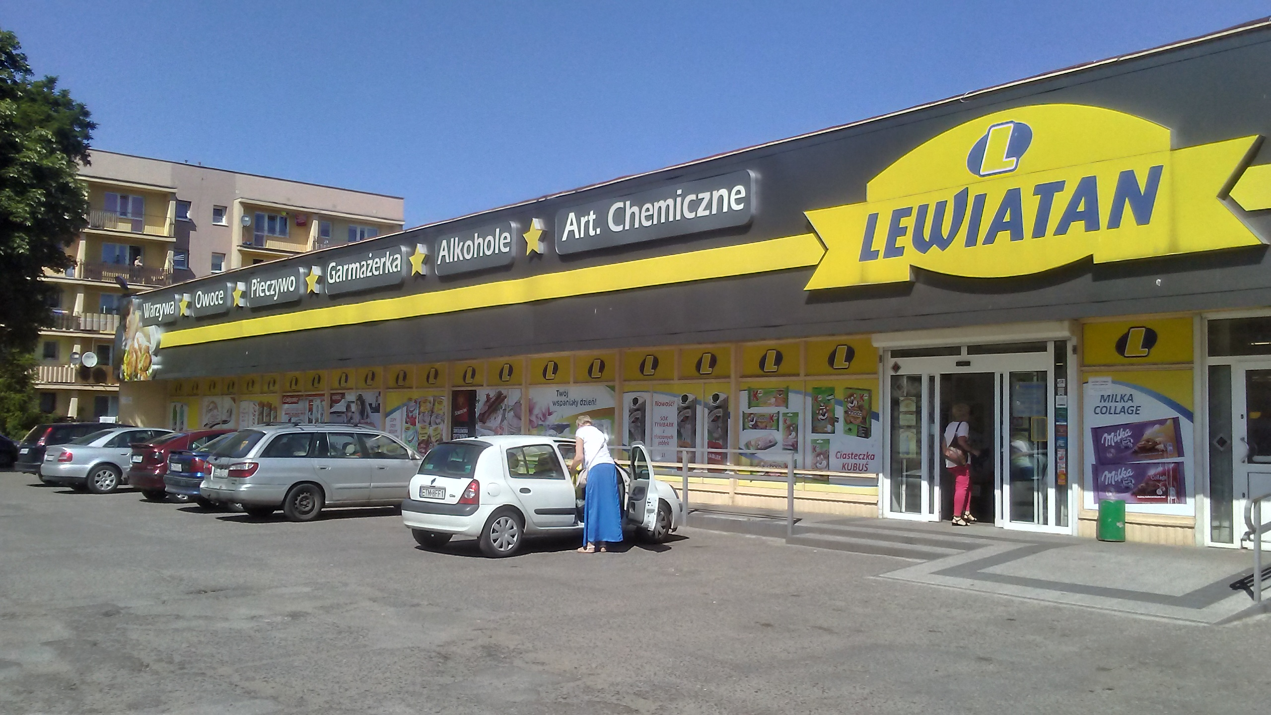 Sklep sieci Lewiatan w 60-tysięcznym Tomaszowie Mazowieckim w województwie łódzkim. Dawny pawilon PSS Społem "Hoża"